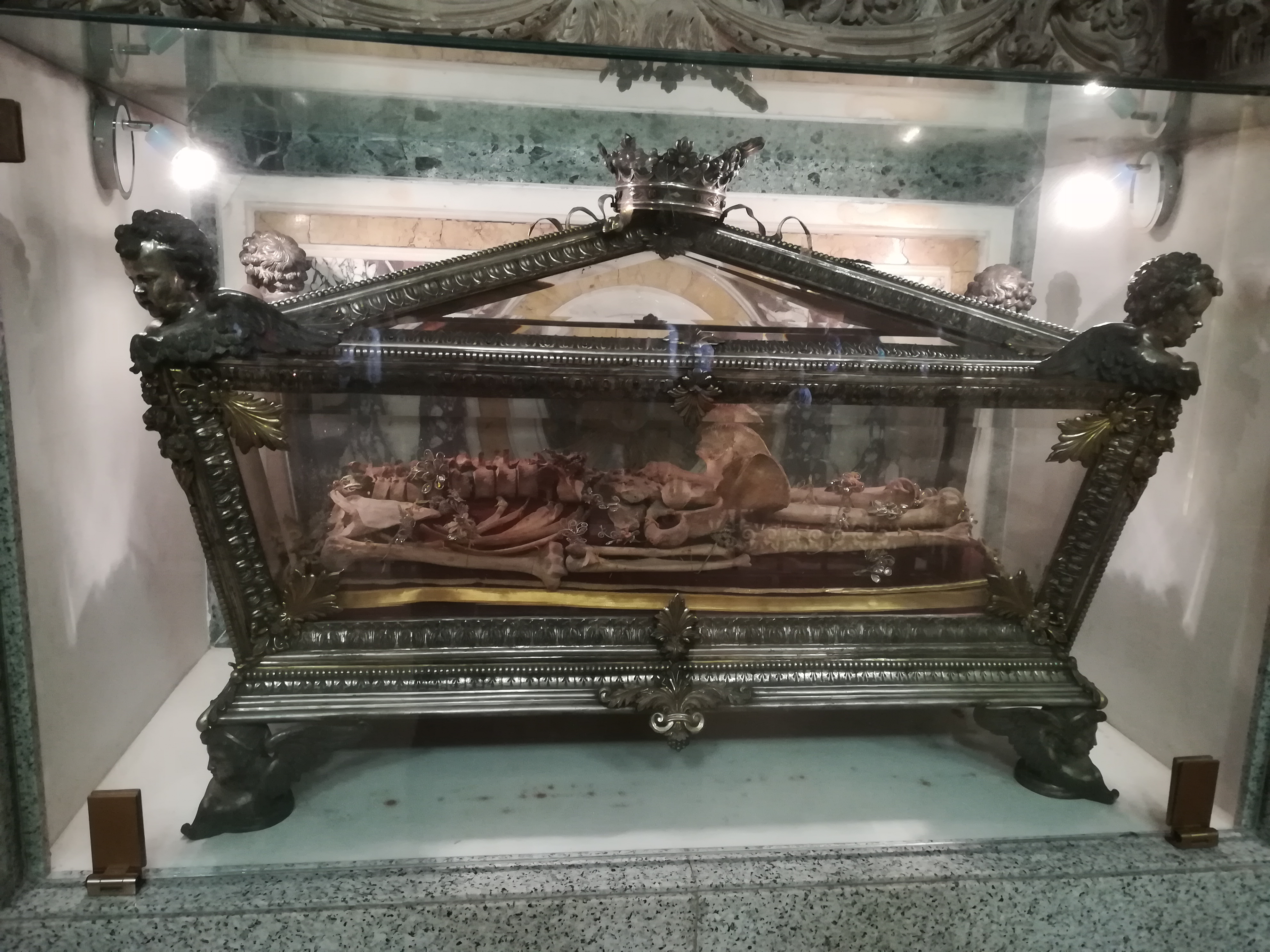 Cattedrale di Santa Maria Assunta, Cappella dei SS. Pietro e Paolo, Molfetta: urna di argento e cristallo contenente i resti mortali del corpo di san Corrado. La reliquia del cranio si conserva in un'altro reliquiario di argento scolpito in forma di mezzo-busto.